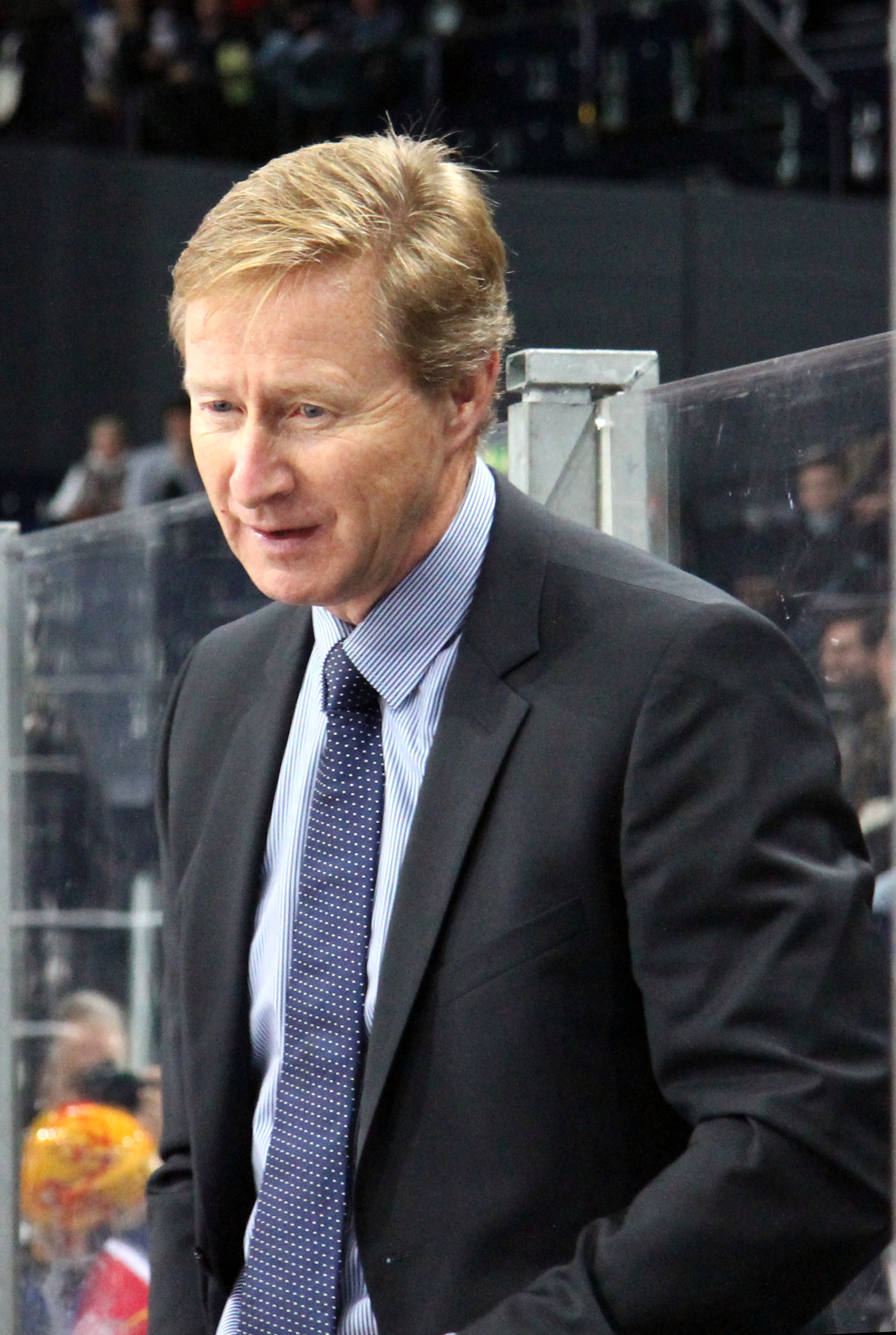 Rob Cookson (Z Assistant Coach).